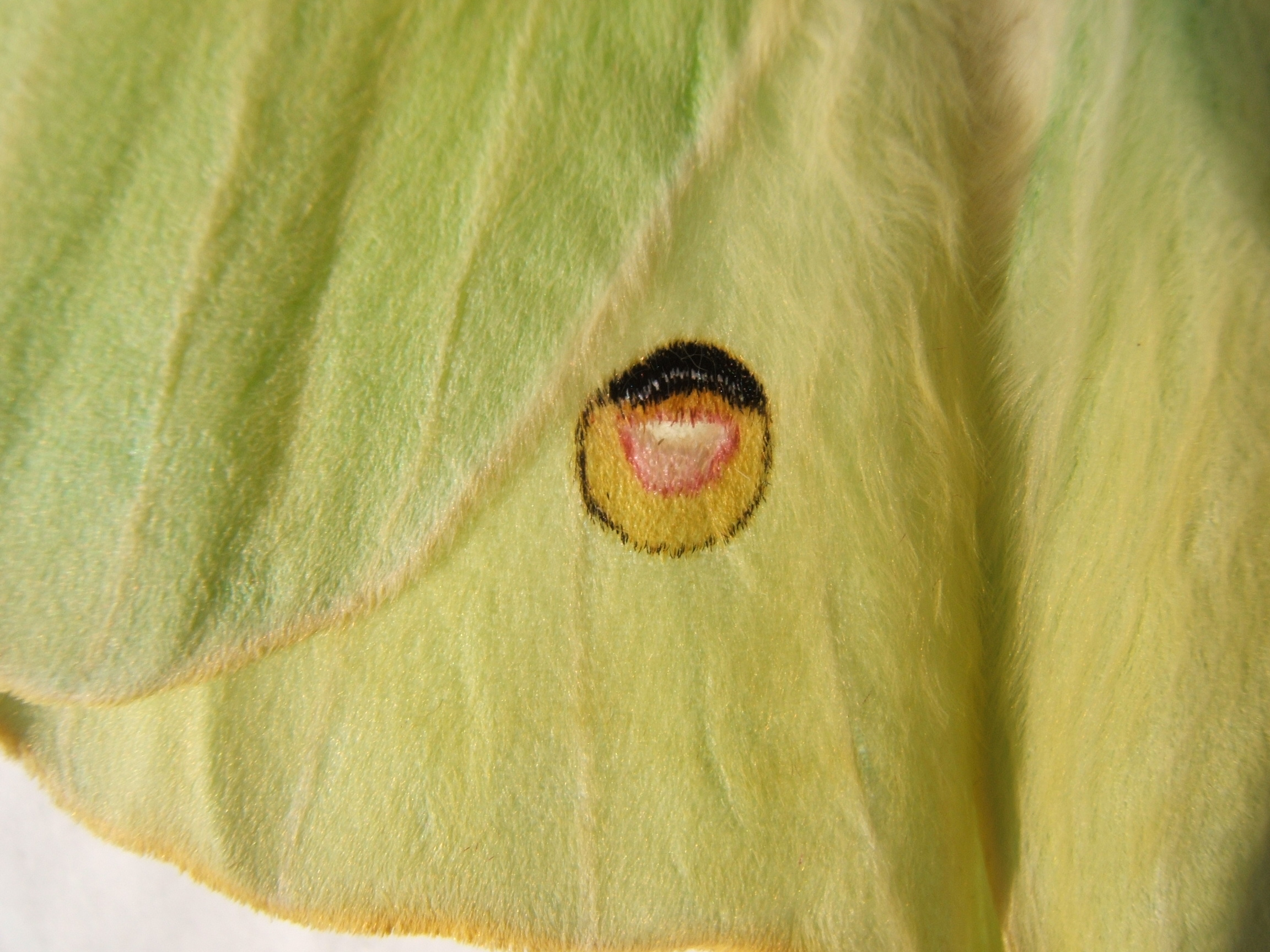 Eyespot of male Actias luna Actias luna eyespot taken by Shawn Hanrahan and reared on American Sweetgum.